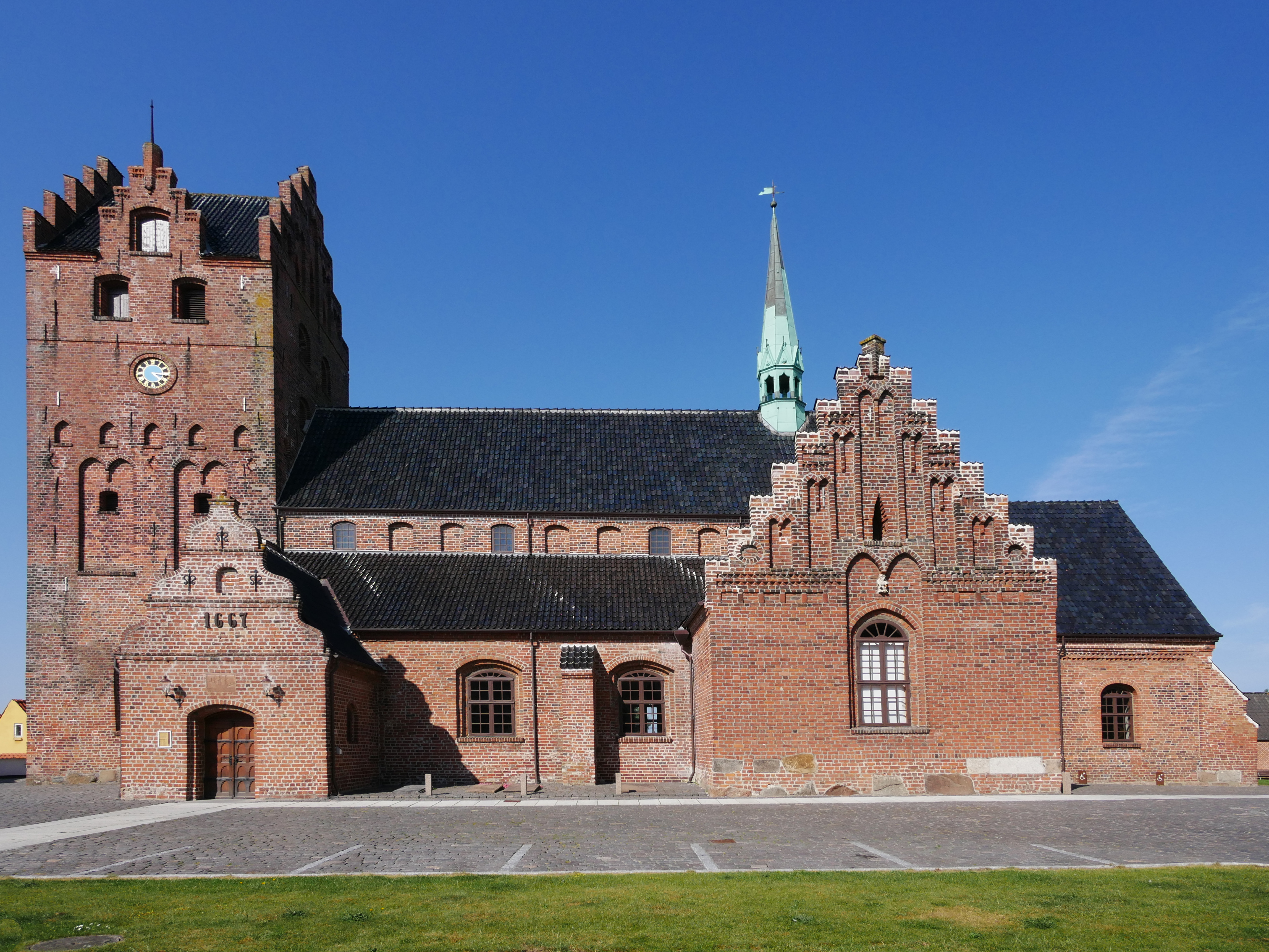 St. Nikolai Kirche von Middelfart (Dänemark)